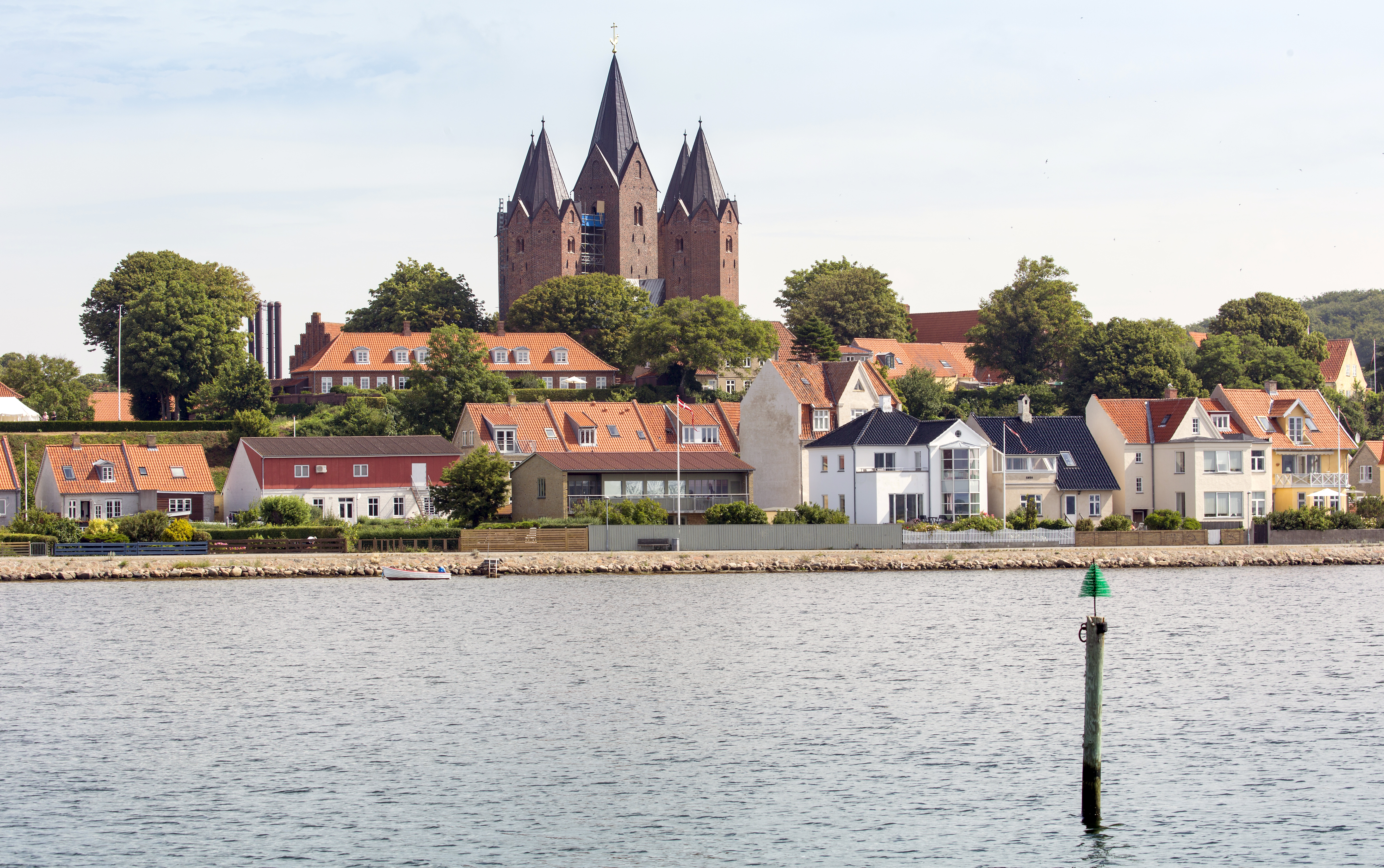 Kalundborg, Denmark